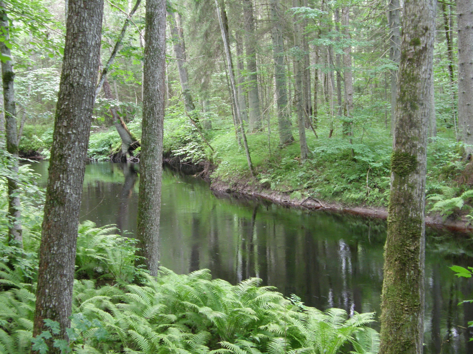 Poruni jõgi.